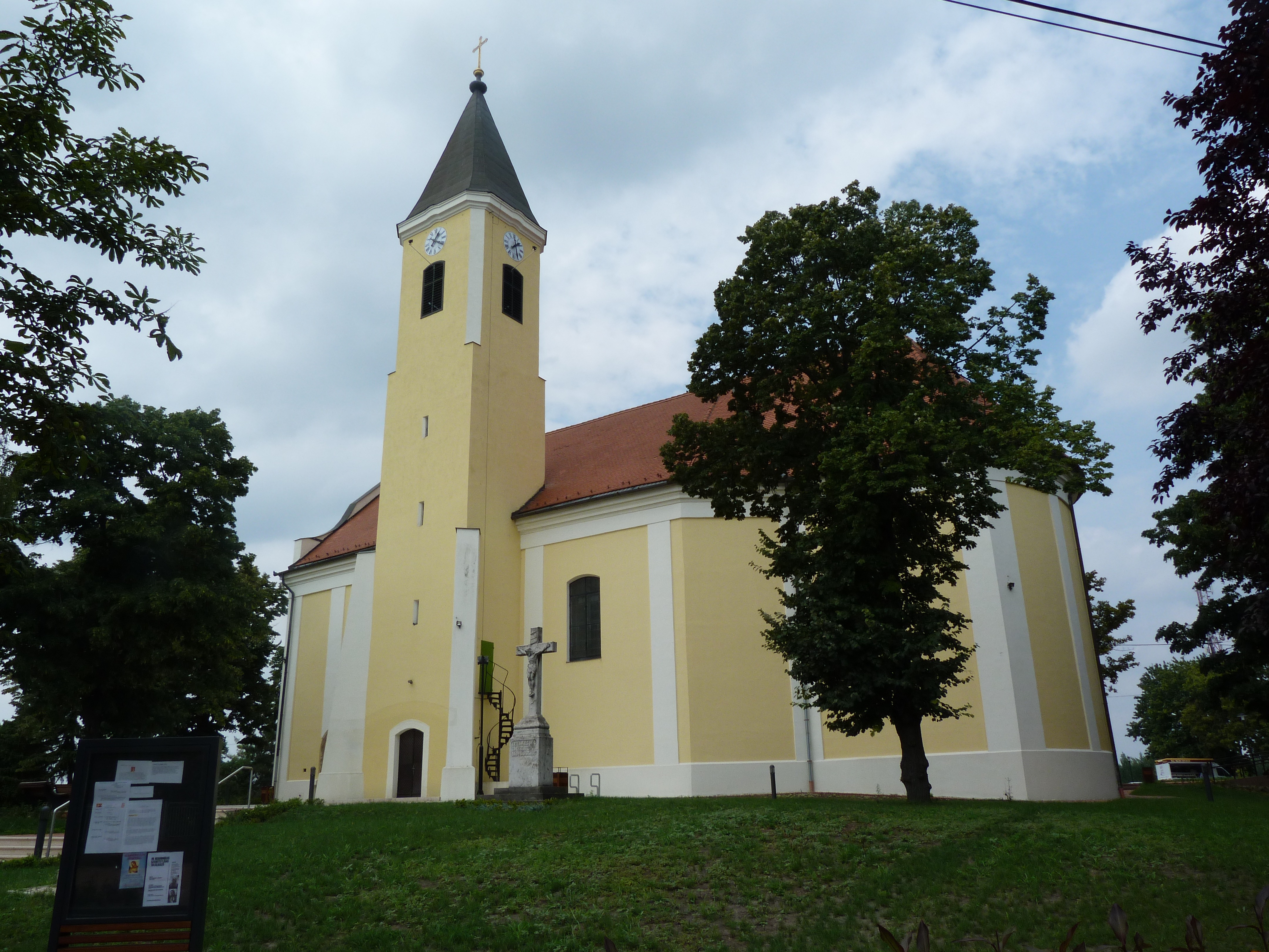 A felvétel 2014. július 30-án, szerdán készült Tökölön. ©© Derzsi Elekes Andor, Budapest, 2014, You are authorised to use these photos and vids under Creative Commons – even for commercial, for profit purposes. Photos must be attributed to Derzsi Elekes Andor. All of the photos and vids in the Metapolisz DVD line are under Creative Commons and can be used even for commercial – for profit – purposes. Recommended Citation Derzsi Elekes Andor: Metapolisz DVD line